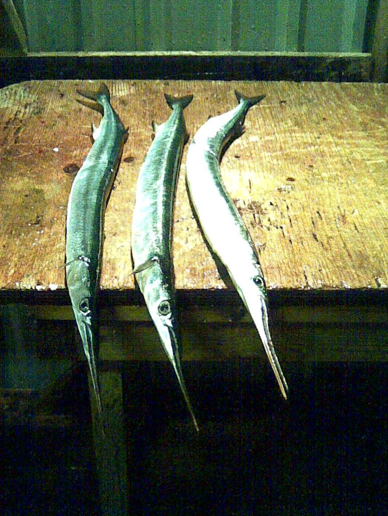 Belone belone